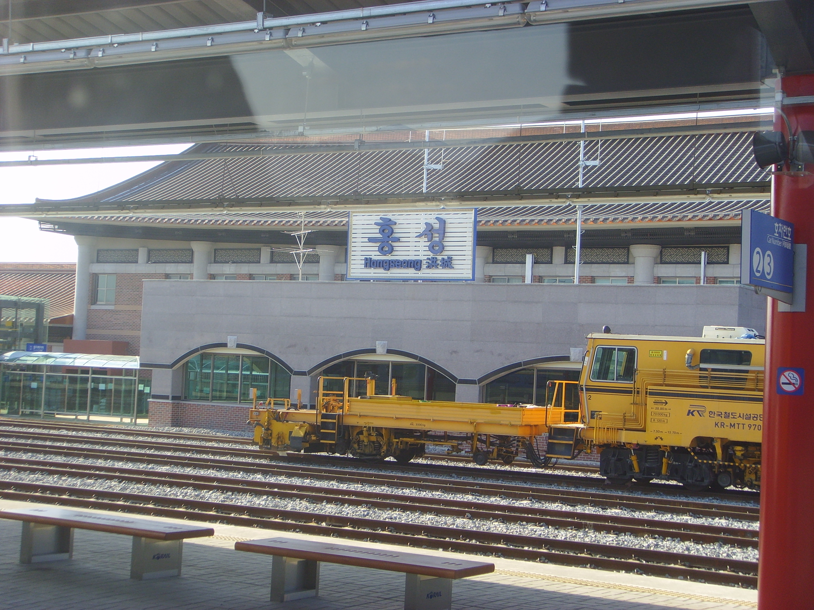 장항선 신홍성역